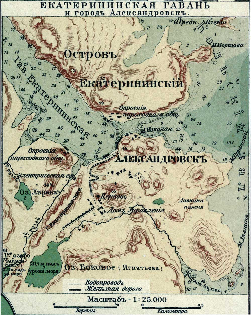 1903 г., "Екатерининская гавань и город Александровск". Настольный атлас А. Ф. Маркса, 1903 год" Масштаб 1: 25 000 см